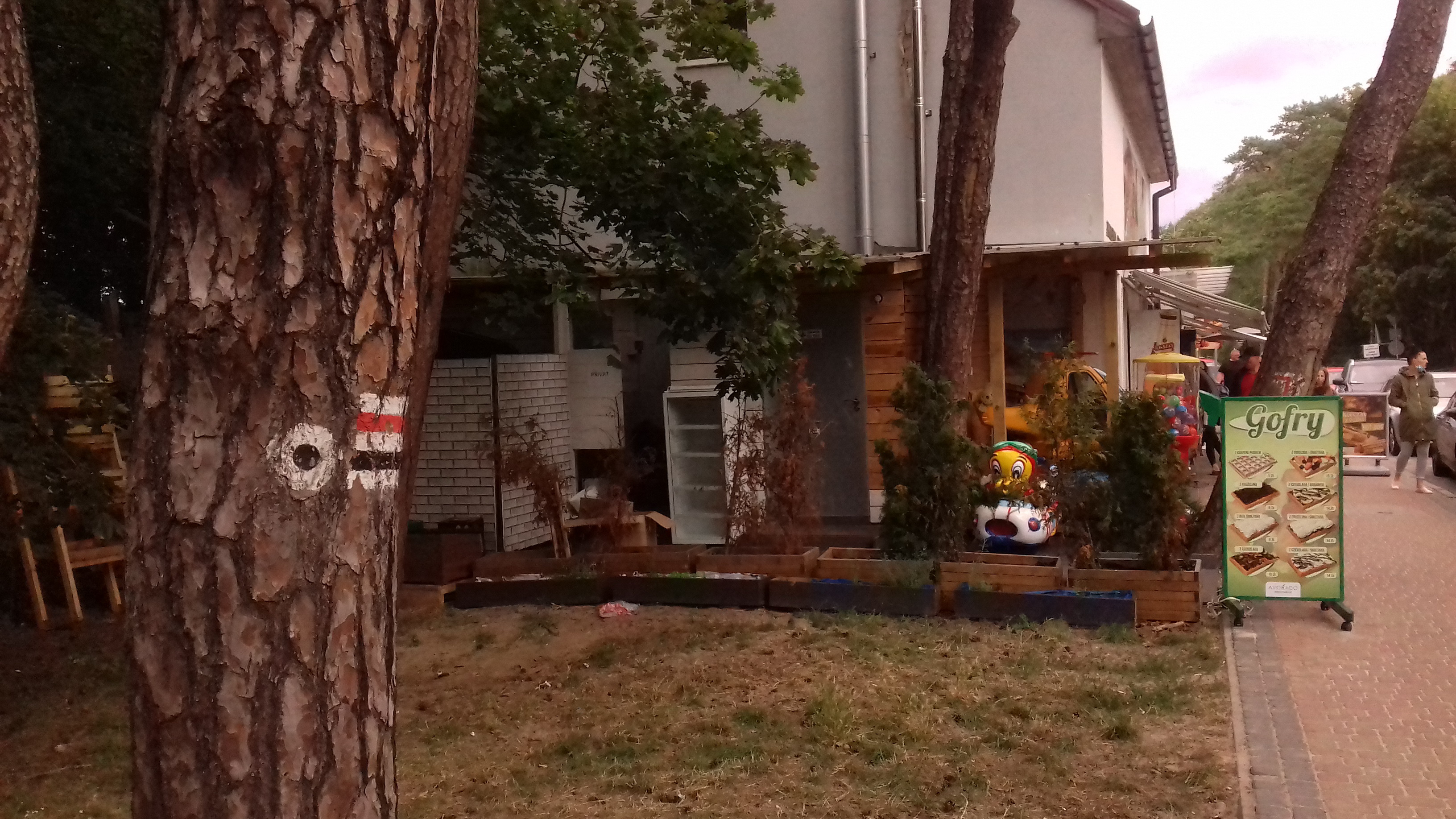 Oznaczenie Szlaku Nadmorskiego i początku Szlaku na Kawczą Górę na Promenadzie Gwiazd w Międzyzdrojach